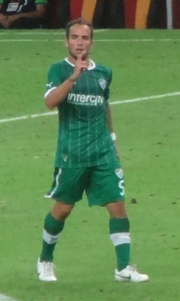 Fernando Belluschi